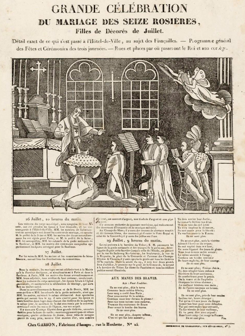 Estampe